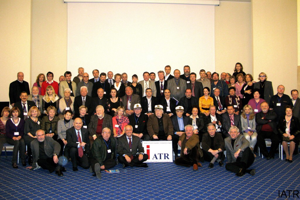 Состав Правления Академии